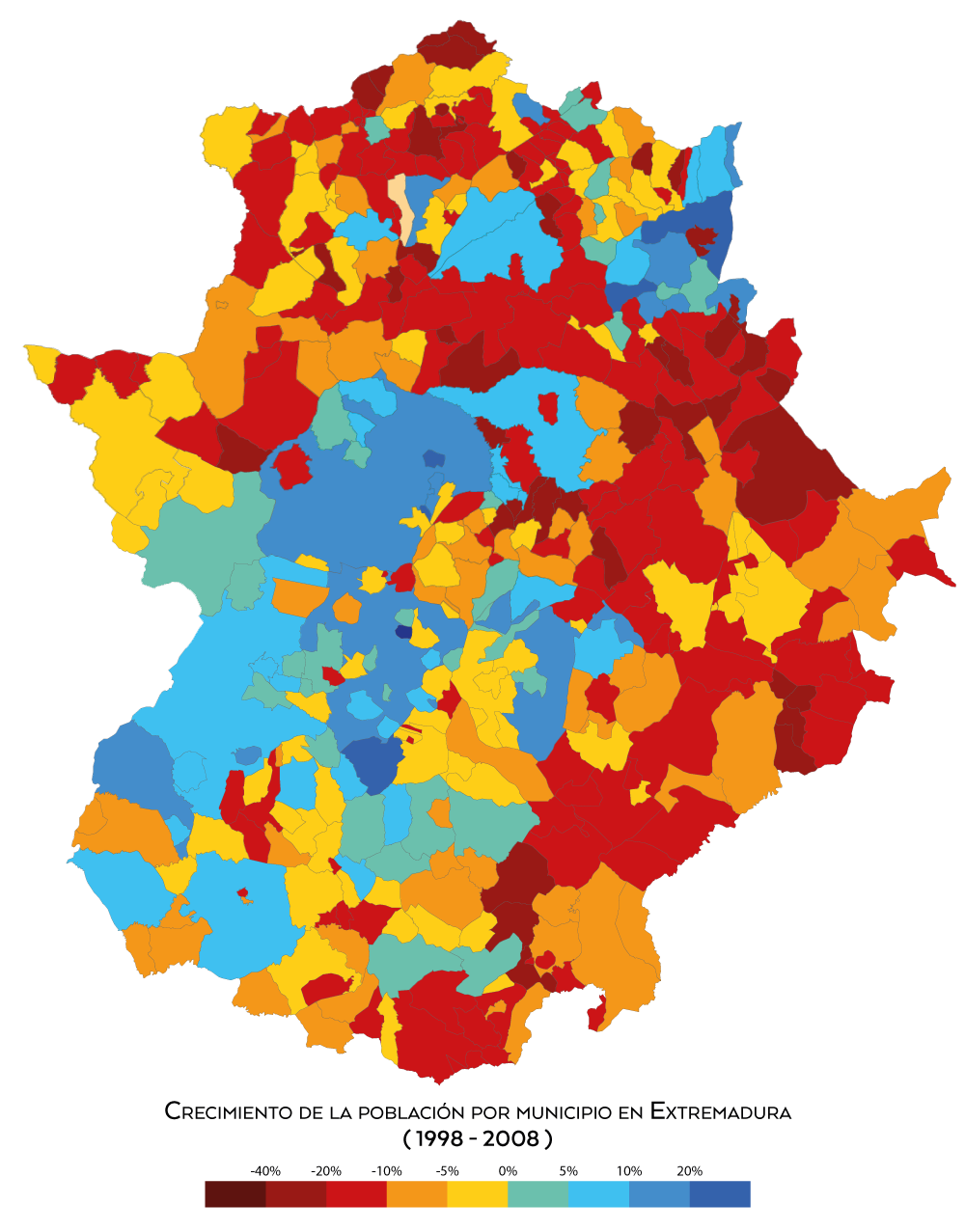 Crecimiento de la población por municipio en Extremadura entre los años 1998 y 2008